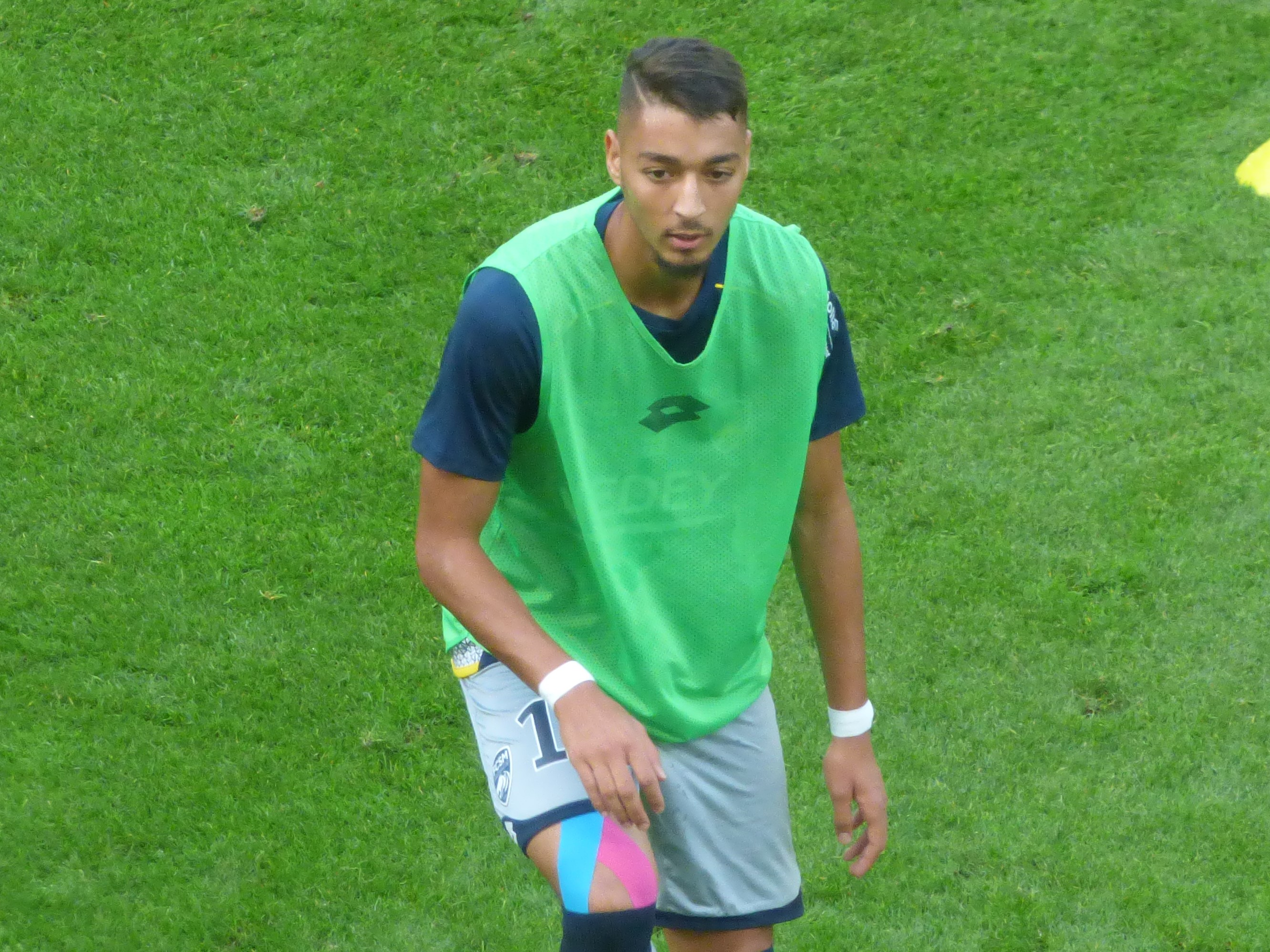 Sofiane Daham avant le match Lens / Sochaux, comptant pour la septième journée du championnat de France de football de Ligue 2, le 15 septembre 2018.